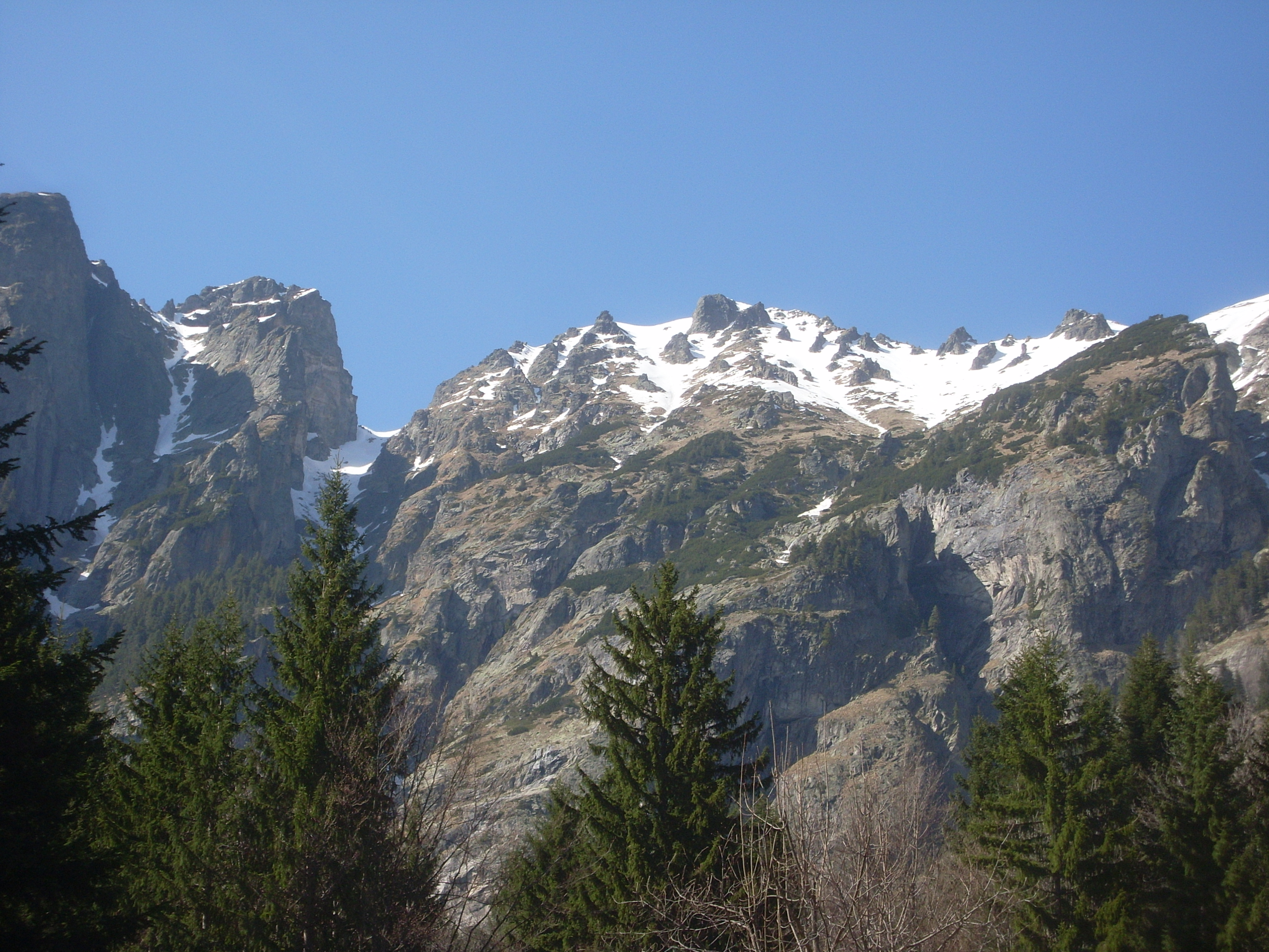 Montañas cercanas a Rila donde se aprecian rocas escarpadas y nieve, Rila, Bulgaria, 2011